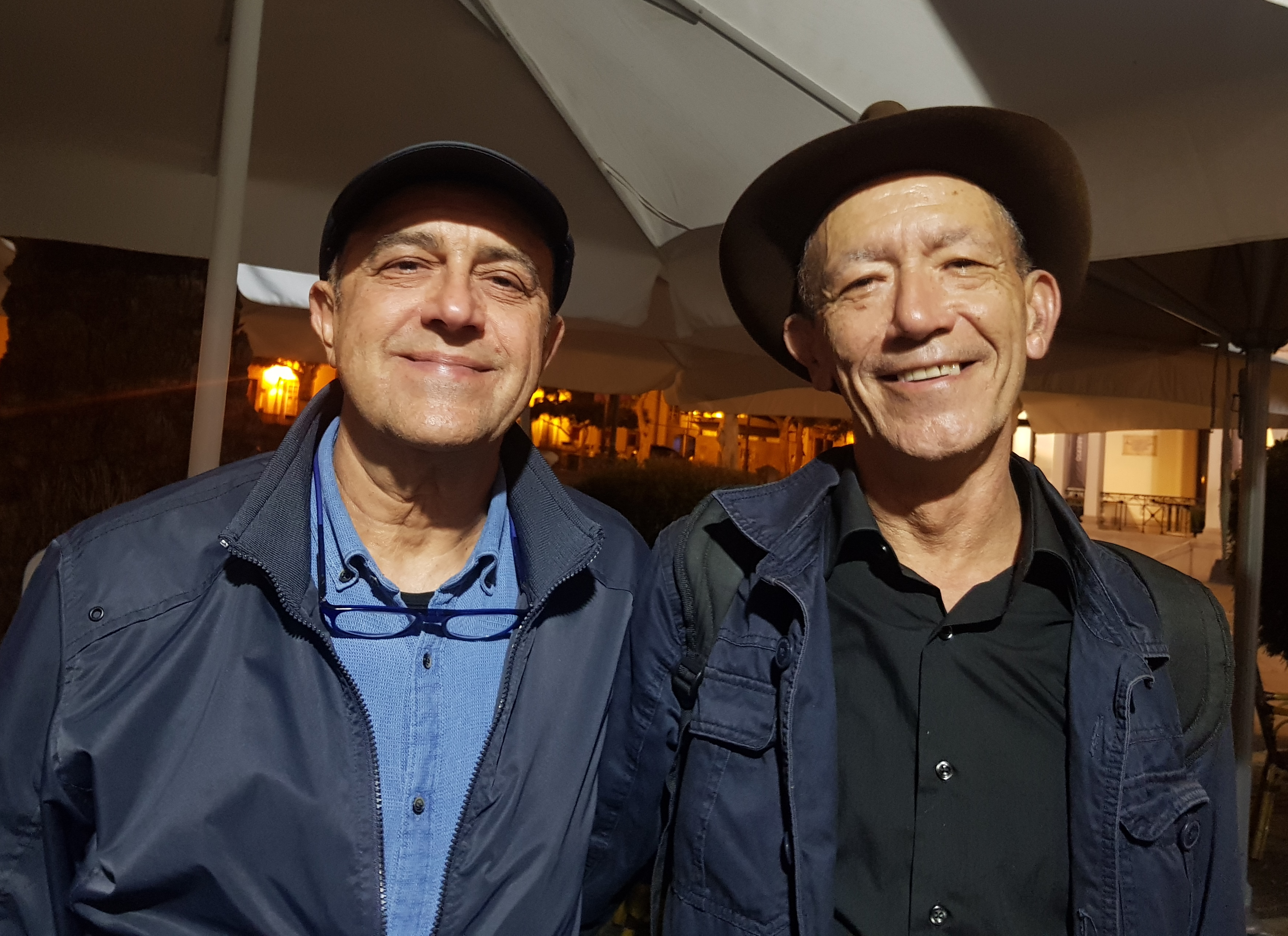 Dúo de Humoristas canarios